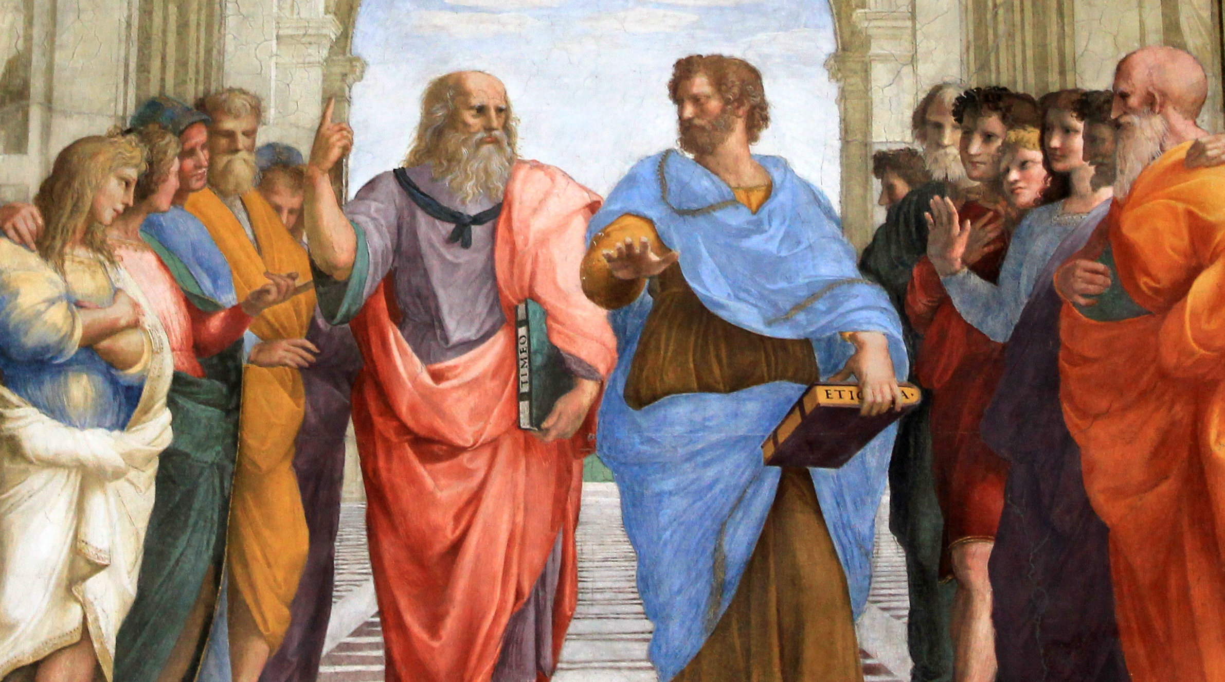 cropped